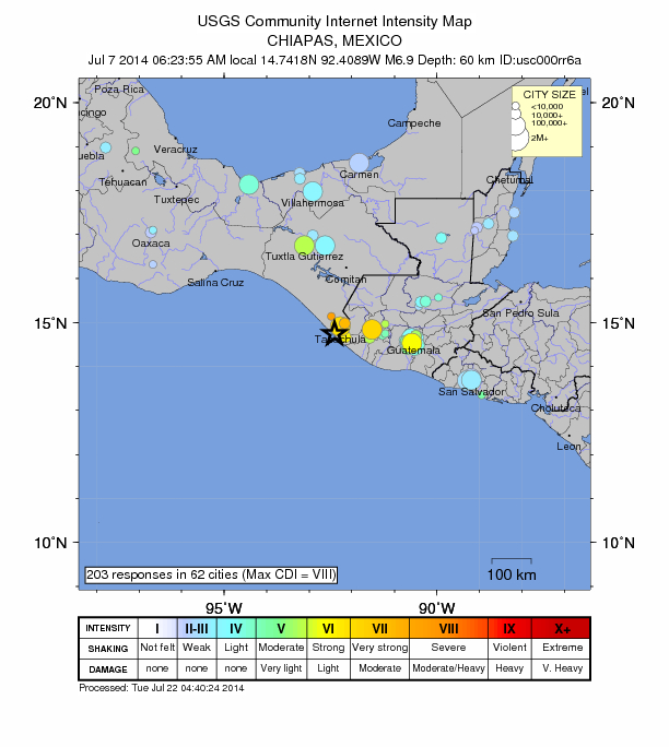 Reportes de personas que sintieron el sismo de Chiapas de julio de 2014.